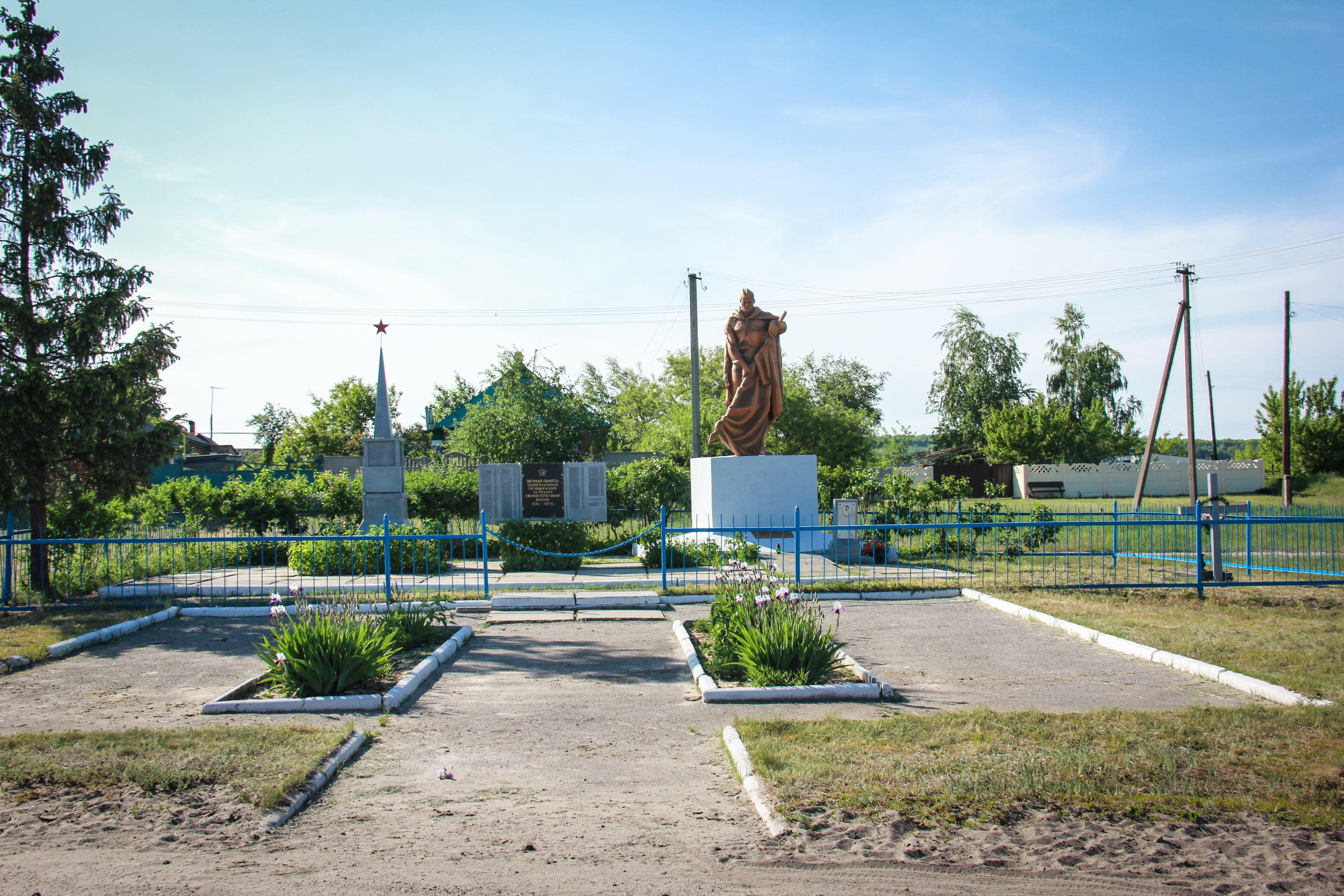 Братська могила радянських воїнів та могила Щегельського В.І., с. Задонецьке.